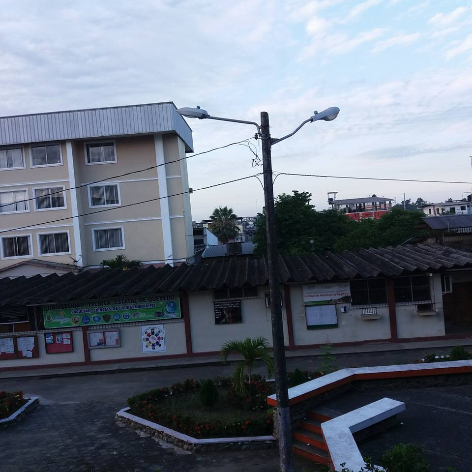 Edificio de practicas de Hoteleria y Turismo en la Universidad Tecnica Estatal de Quevedo